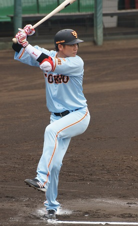 Giantssakamoto6